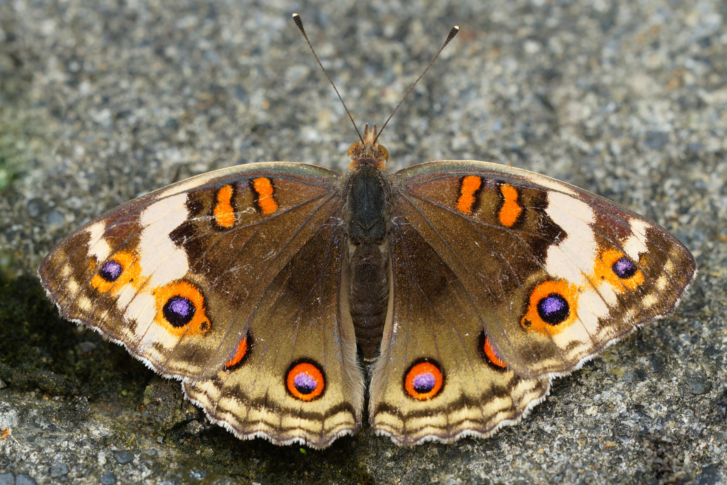 青眼蛺蝶 Junonia orithya